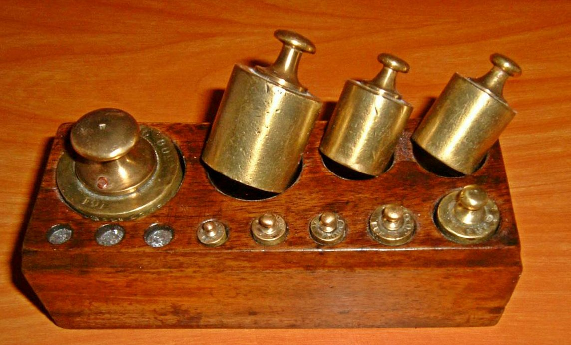 Série de poids cylindriques laiton Original von Clipper